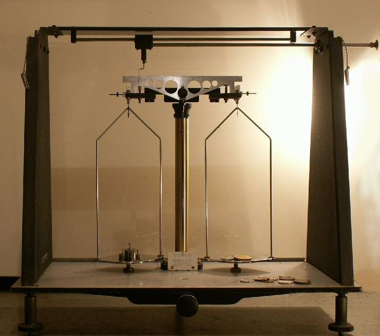 Eigen opname